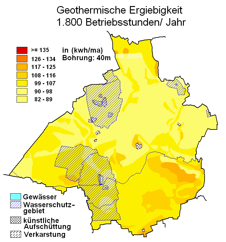 geothermische Karte Bünde (Westfalen)